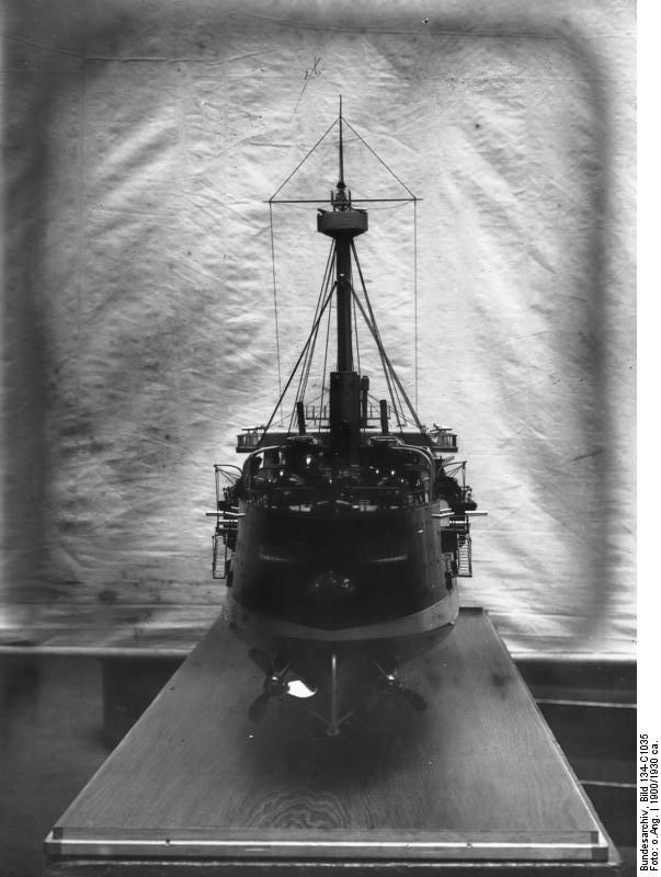 Panzerschiff Oldenburg, Modell SMS Oldenburg, Panzerschiff, Stapell.: 20.12.1884 Modell